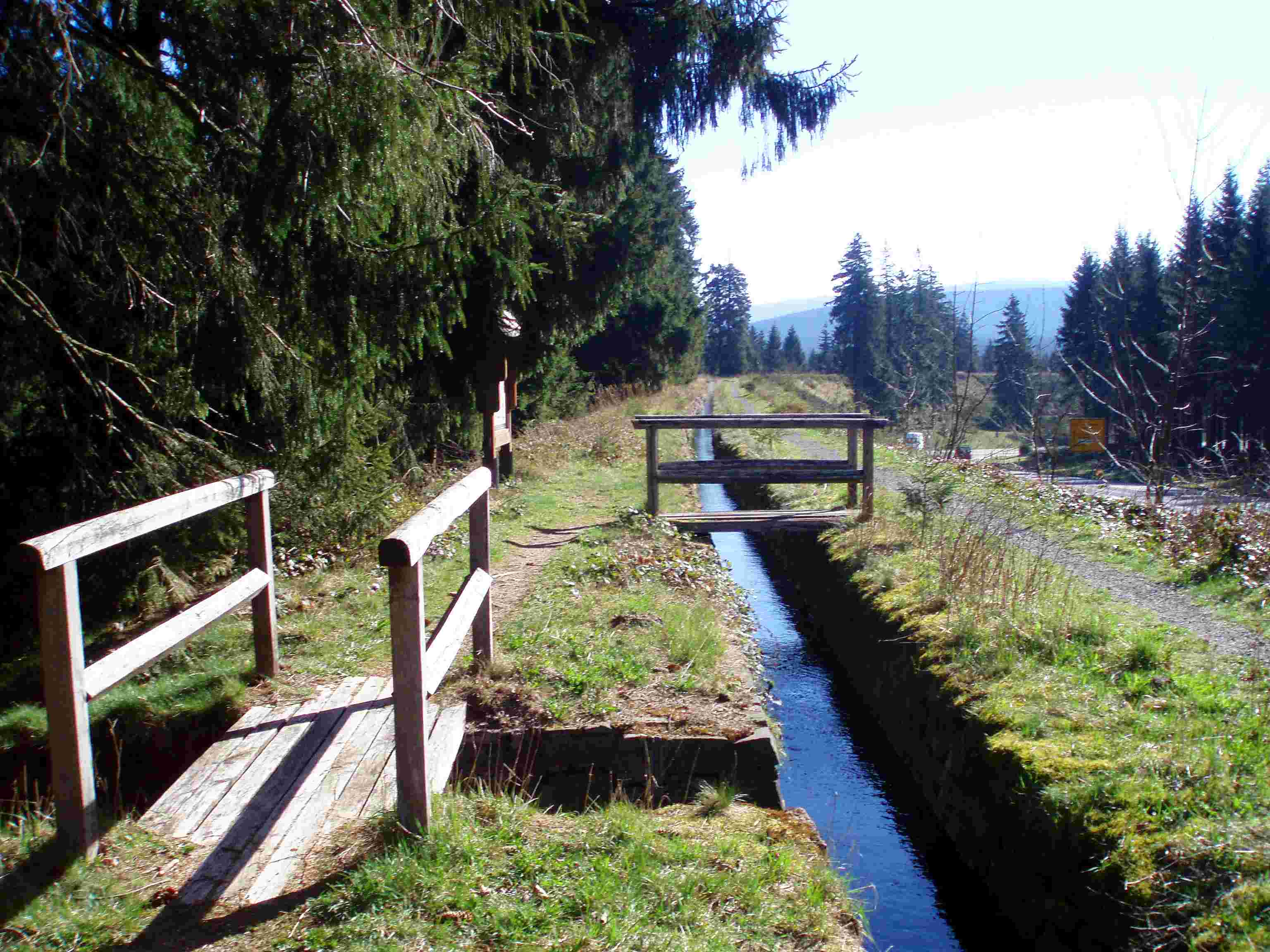 Sperperhaier Damm